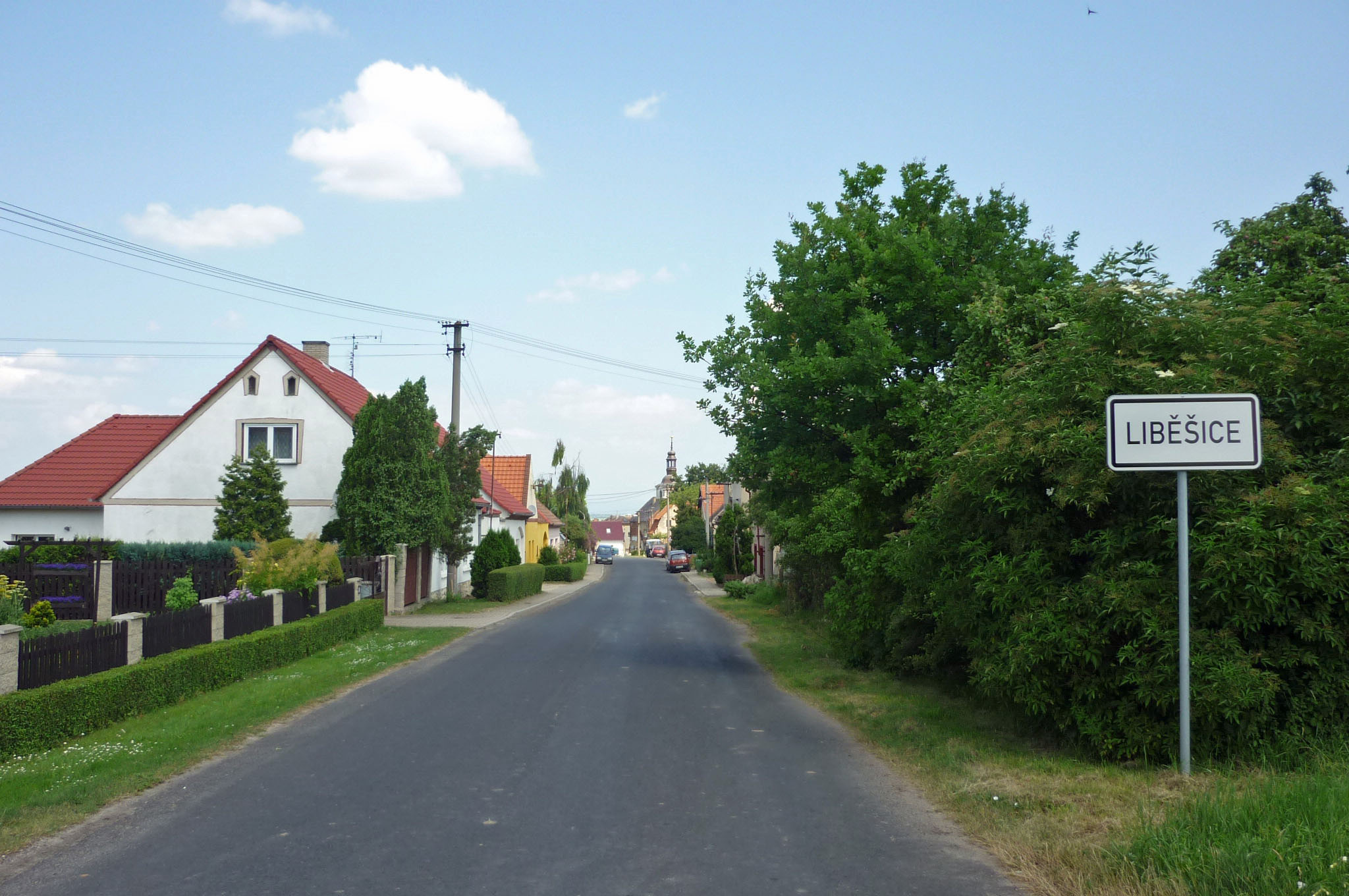 Oberer Ortsteil von Liebeschitz bei Saaz